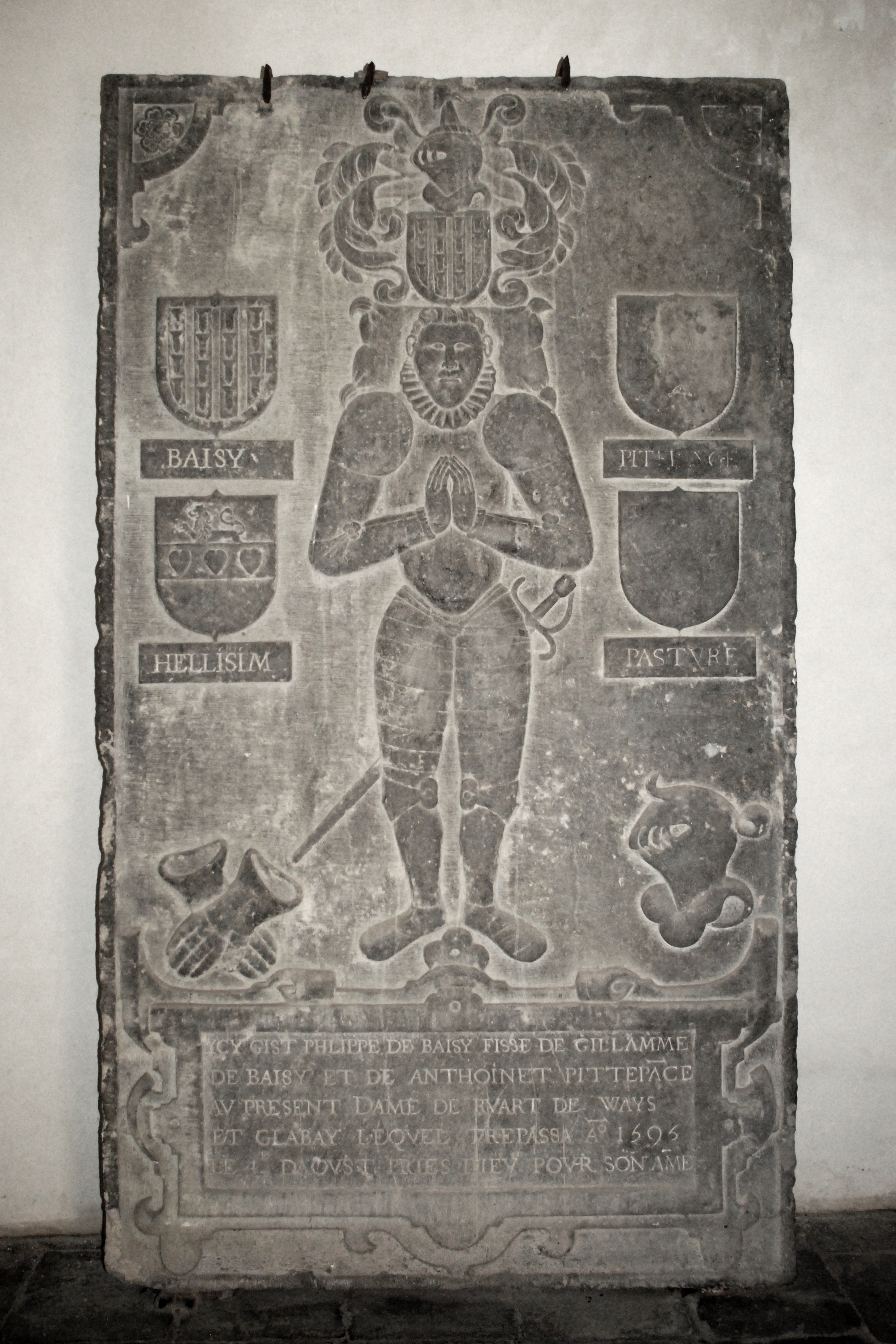 Belgique - Brabant wallon - Ways - Dalle funéraire de Philippe de Baisy